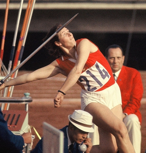 Birutė Kalėdienė, 1964 Olympics